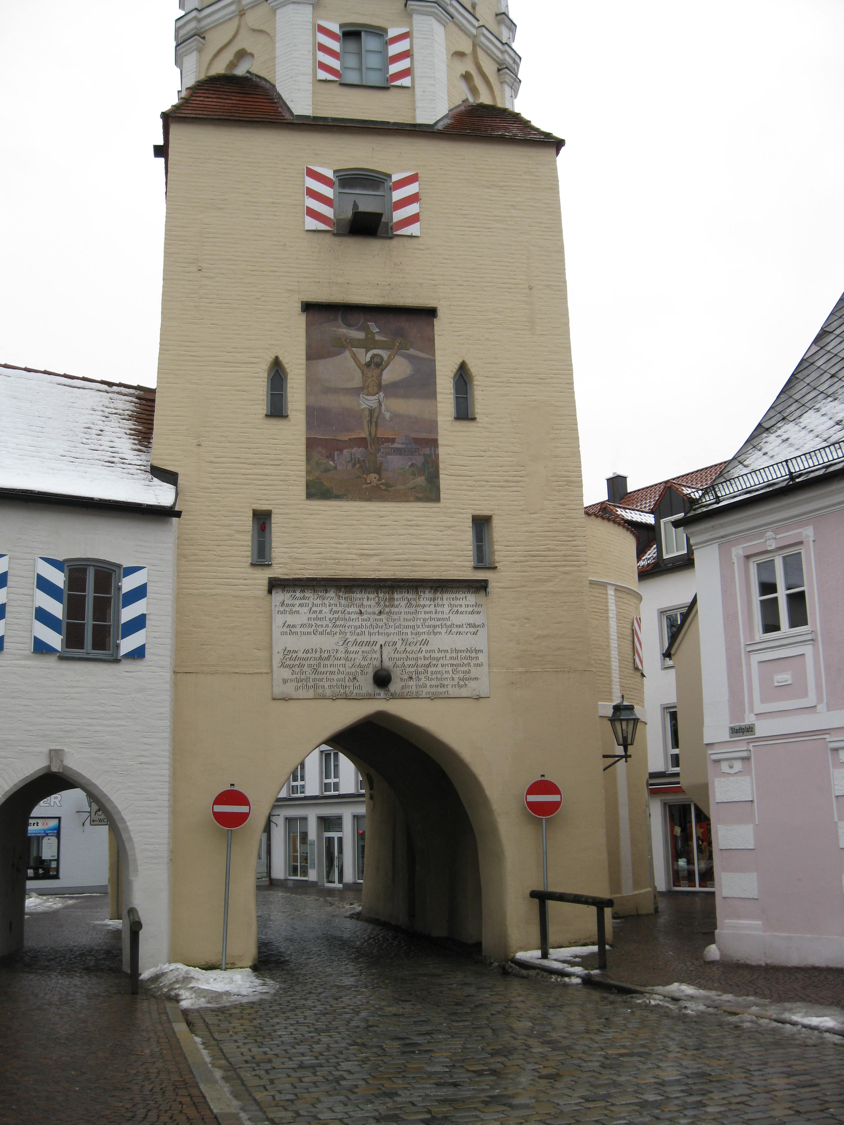 Gebäude in Aichach, Bayern